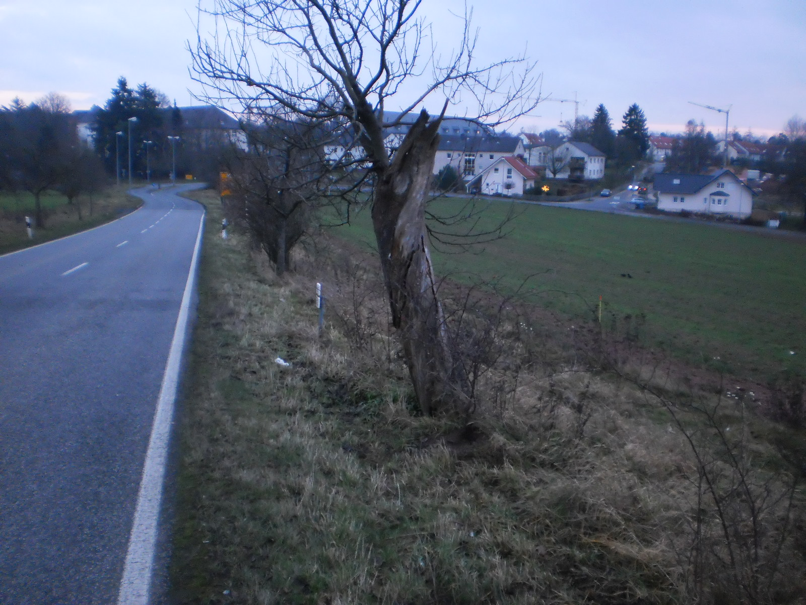 Stadtteil Marburg-Stadtwald mit kartiertem Baum (Nummer 089) an der Kreisstrasse 68 mit Apfelbäumen und Gebüsch zu den Ackerflächen im Westen des Hasenkopfs. Vor den alten Kasernengebäuden und der Zufahrt zum Quartier ein Kreisverkehr.